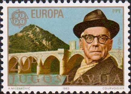 Ivo Andrić